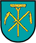 Herb Łubia (gmina Zbrosławice, powiat tarnogórski, województwo śląskie, Polska)